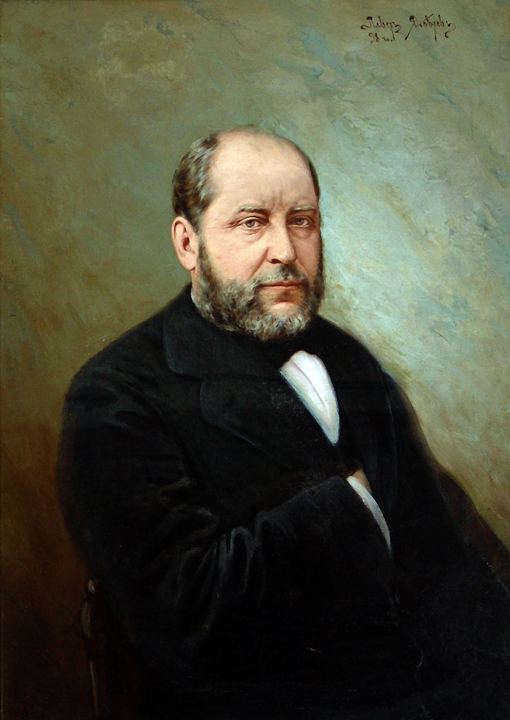 Анато́лий Петро́вич Богда́нов (1834—1896) — русский зоолог, антрополог, историк зоологии, один из основателей российской антропологии, основатель первых антропологических учреждений в России, популяризатор естественных наук, член-корреспондент Петербургской академии наук, профессор Московского университета